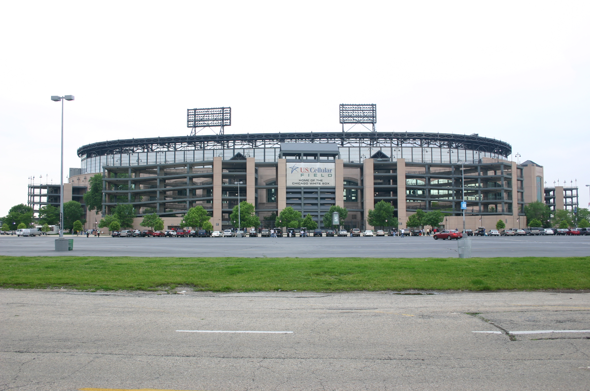 U.S. Cellular Field Außenanblick